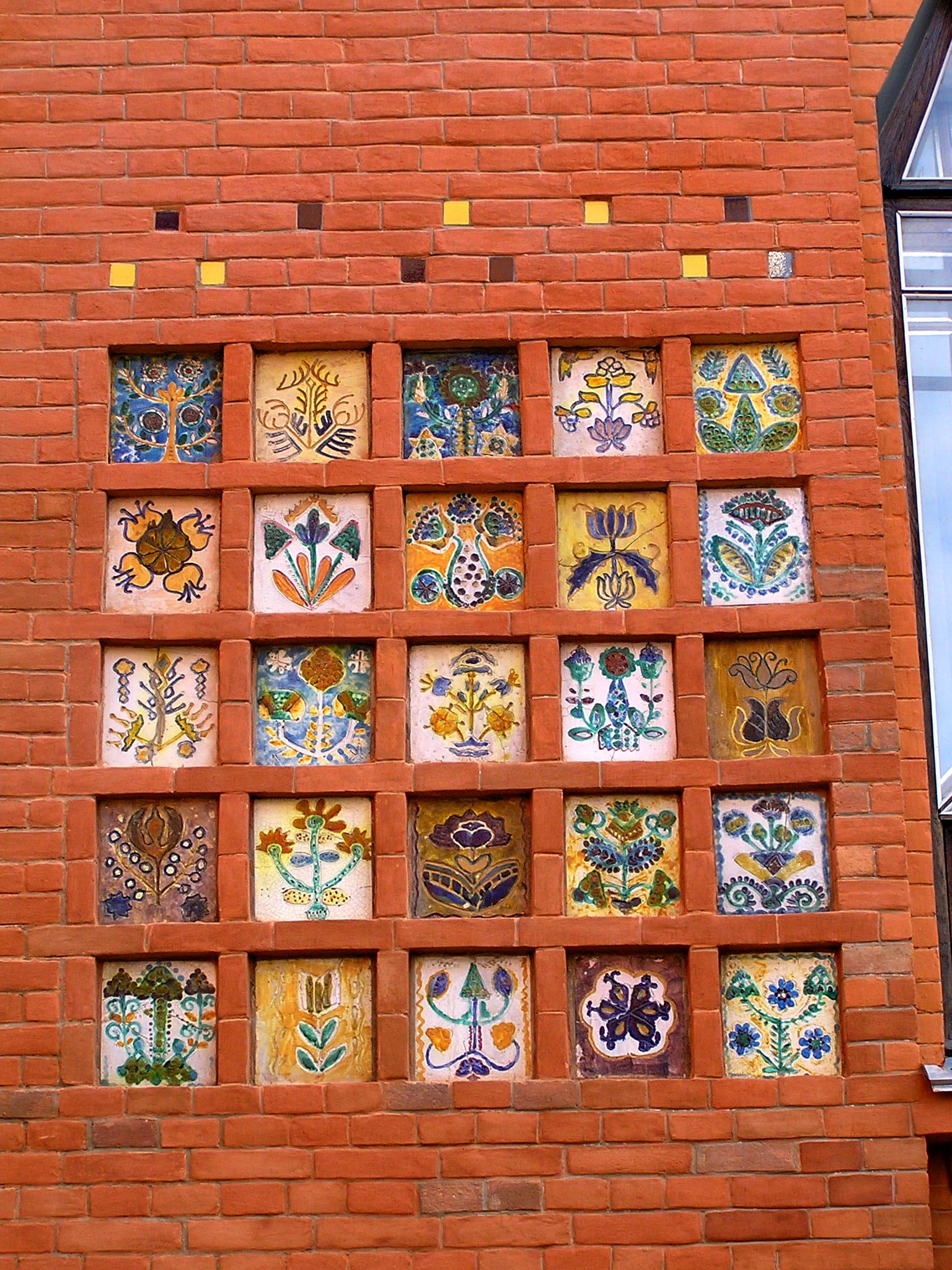 Кахлі у нішках біля входу з боку дворового фасаду Будинку Полтавського губернського земства. Стиль - український архітектурний модерн. Архітектор - В.Г.Кричевський.